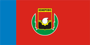 Afbeelding: vlag vd Russische stad Kemerovo